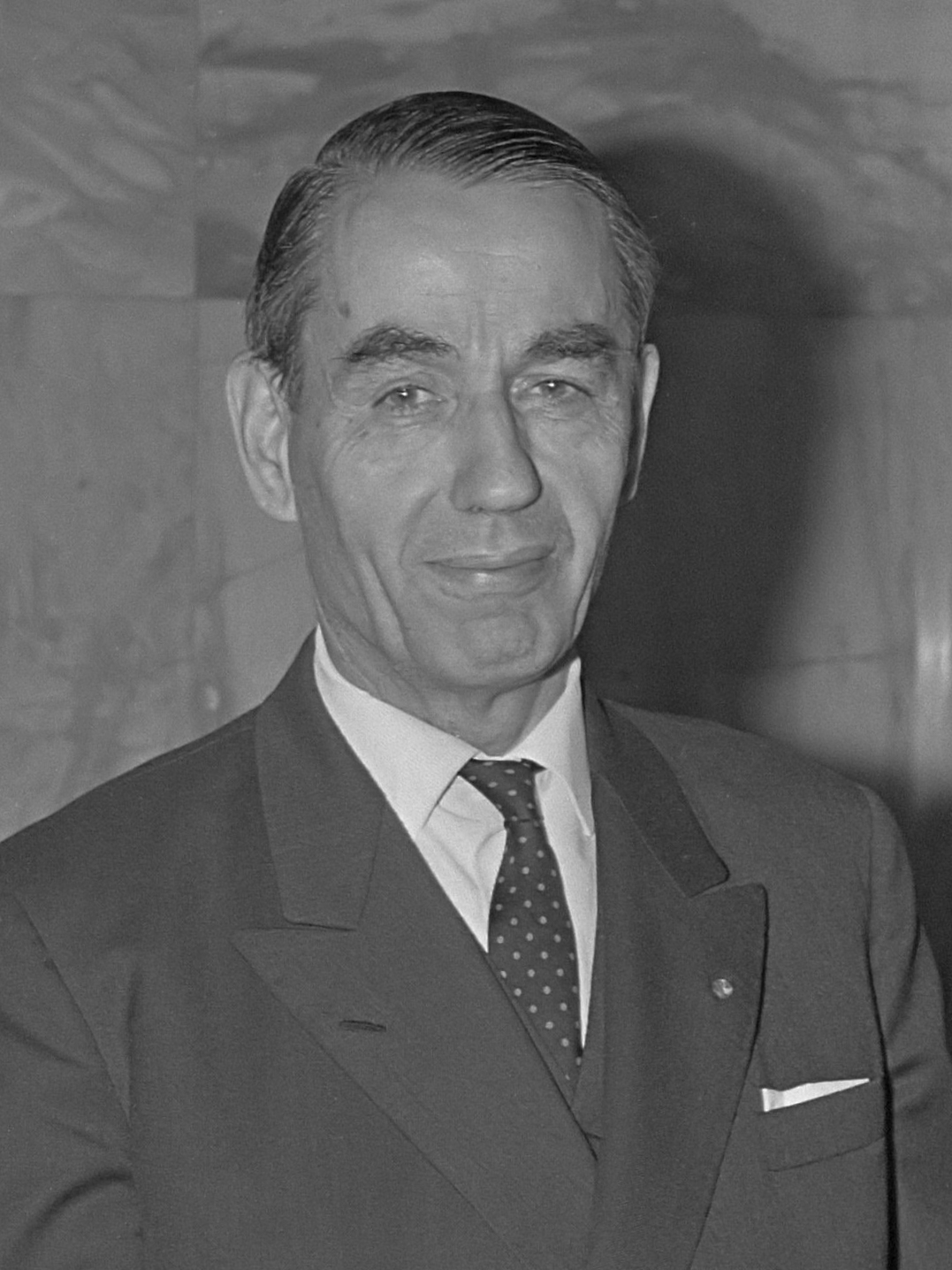 Keukenhof 1967 open, Burgemeester van leiden, Van Willigen 21 maart 1967